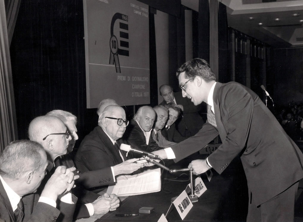 Francesco Palladino riceve da Eugenio Montale la Medaglia d'oro del Presidente della Repubblica al Premio di giornalismo Campione d’Italia 1977